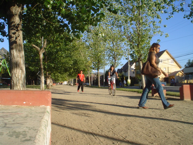 Parque Central Ciudad Satelite